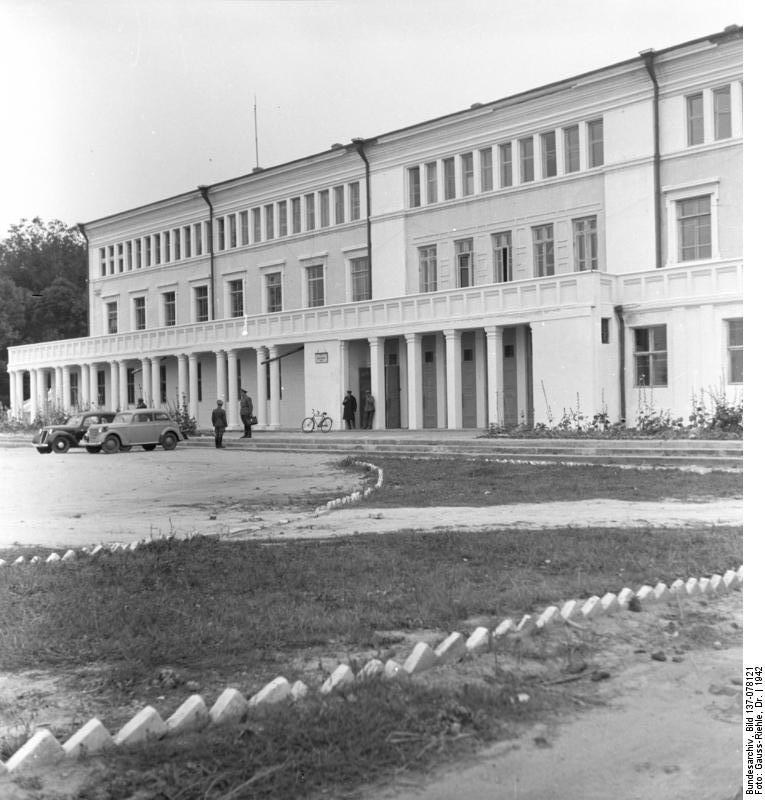 Zwiahel, Ukraine/Wolhynien, Gebäude des Gebietskommissars